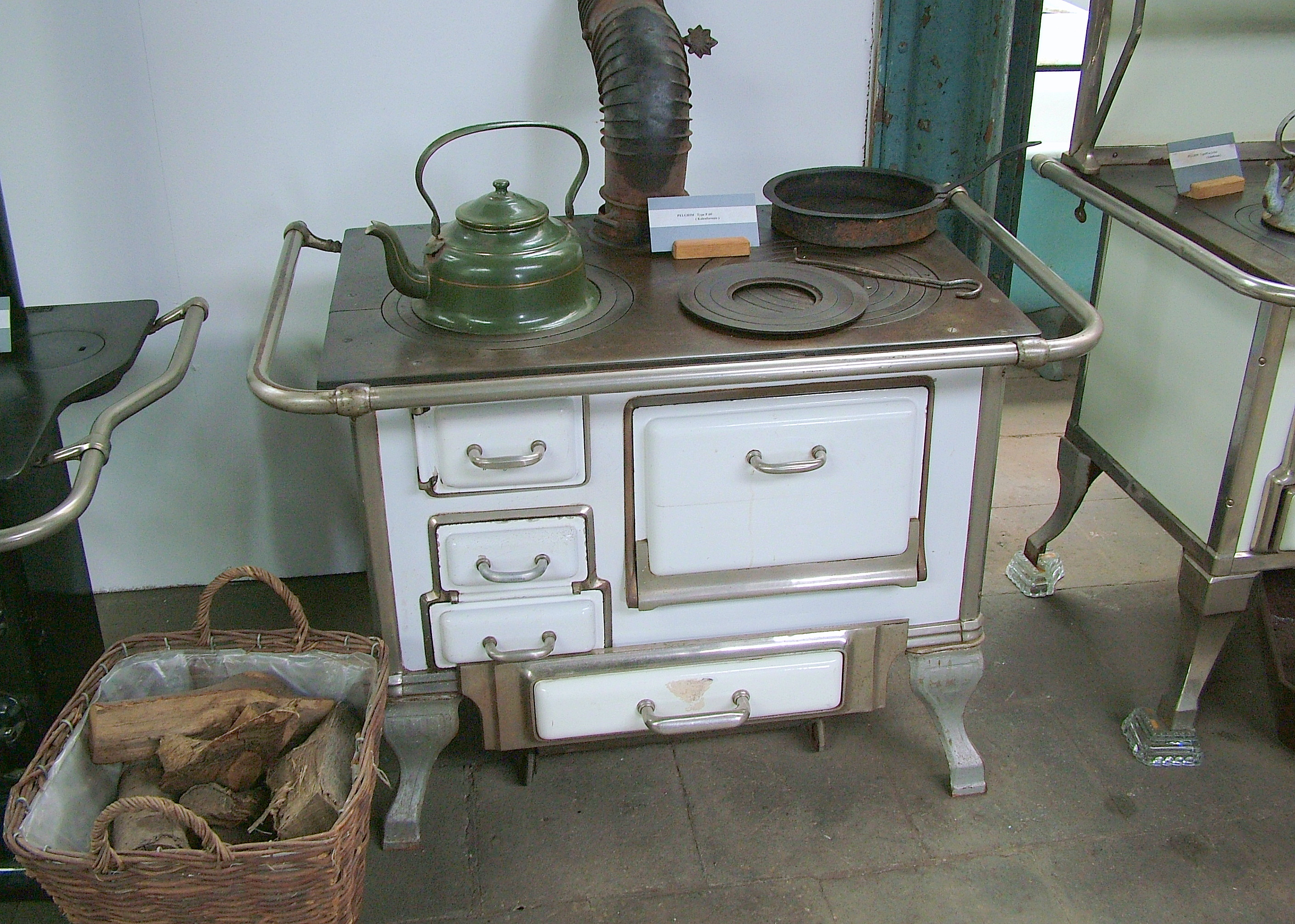 Tentoonstelling voormalig DRU-terrein.